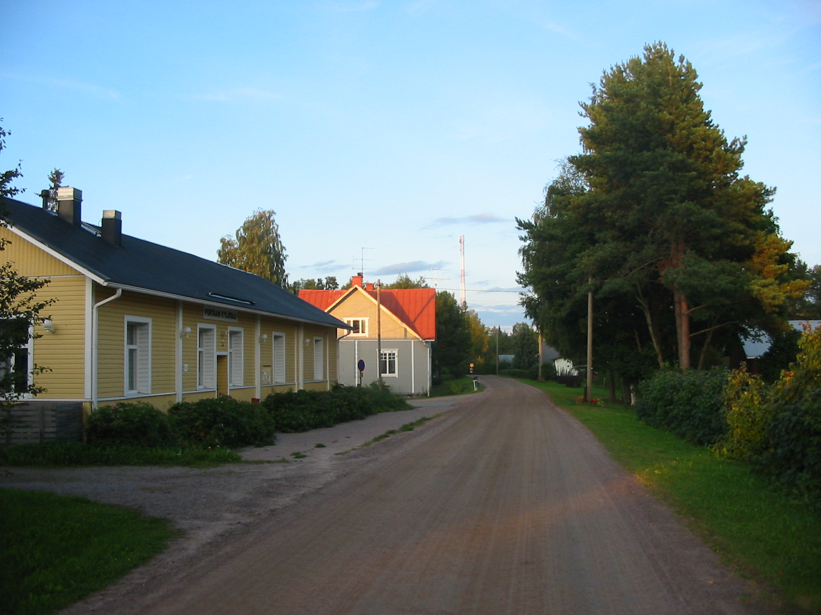 Portaan kylänraittia Tammelassa. Portaanraitti on osa historiallista Hämeen härkätietä. Vasemmalla Portaan kylätalo.